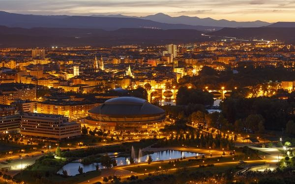 Vista nocturna de Logroño desde el Monte Cantabria